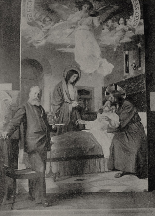 Prof. Heinrich Lauenstein, Düsseldorf, vor seinem Gemälde "Sei getreu bis in den Tod"